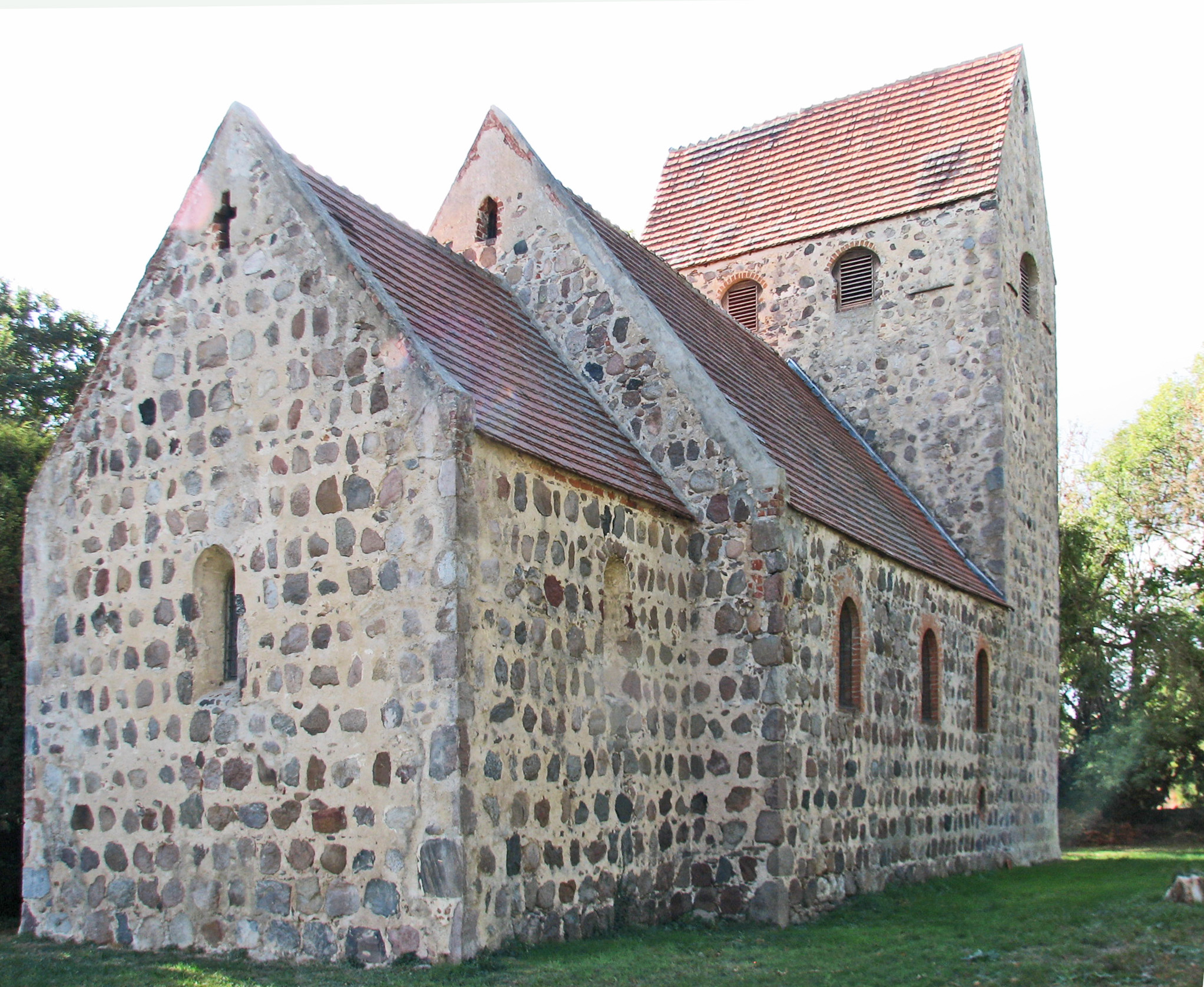 Die Kirche zu Binde (Oktober 2018).